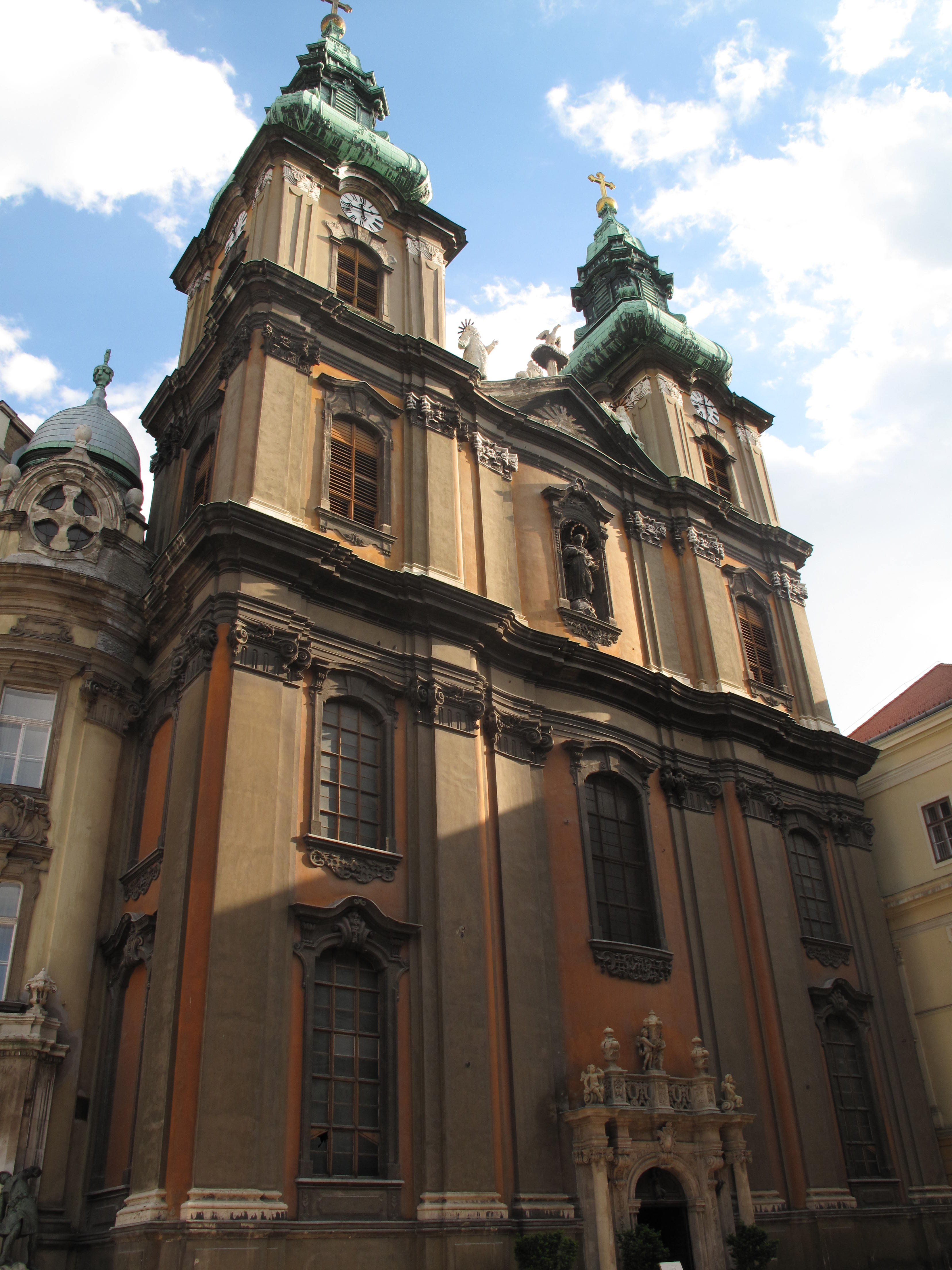 Budapešť